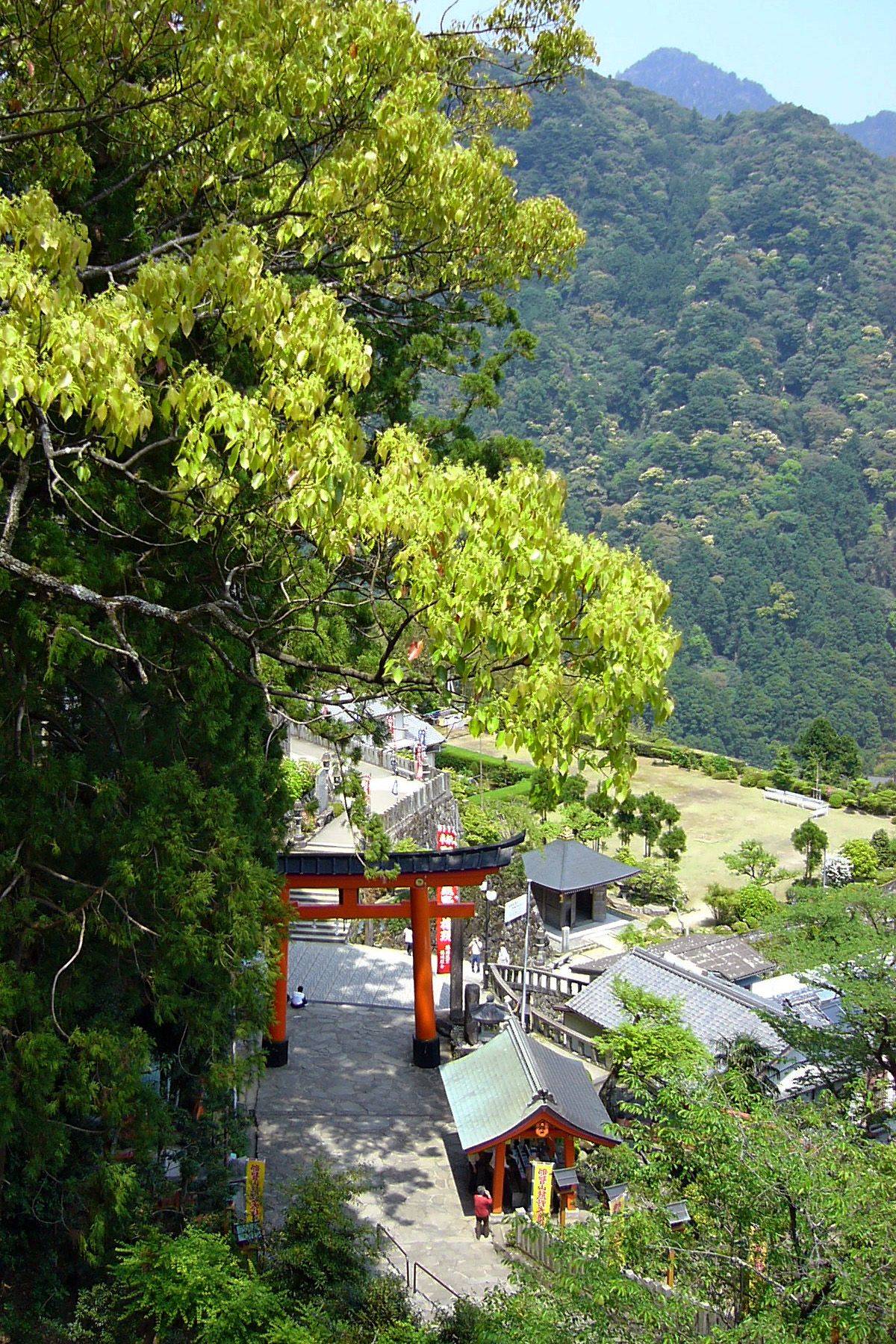 Kumano-Nachi-shrine in Nachikatsuura, Wakayama Prefecture, Japan